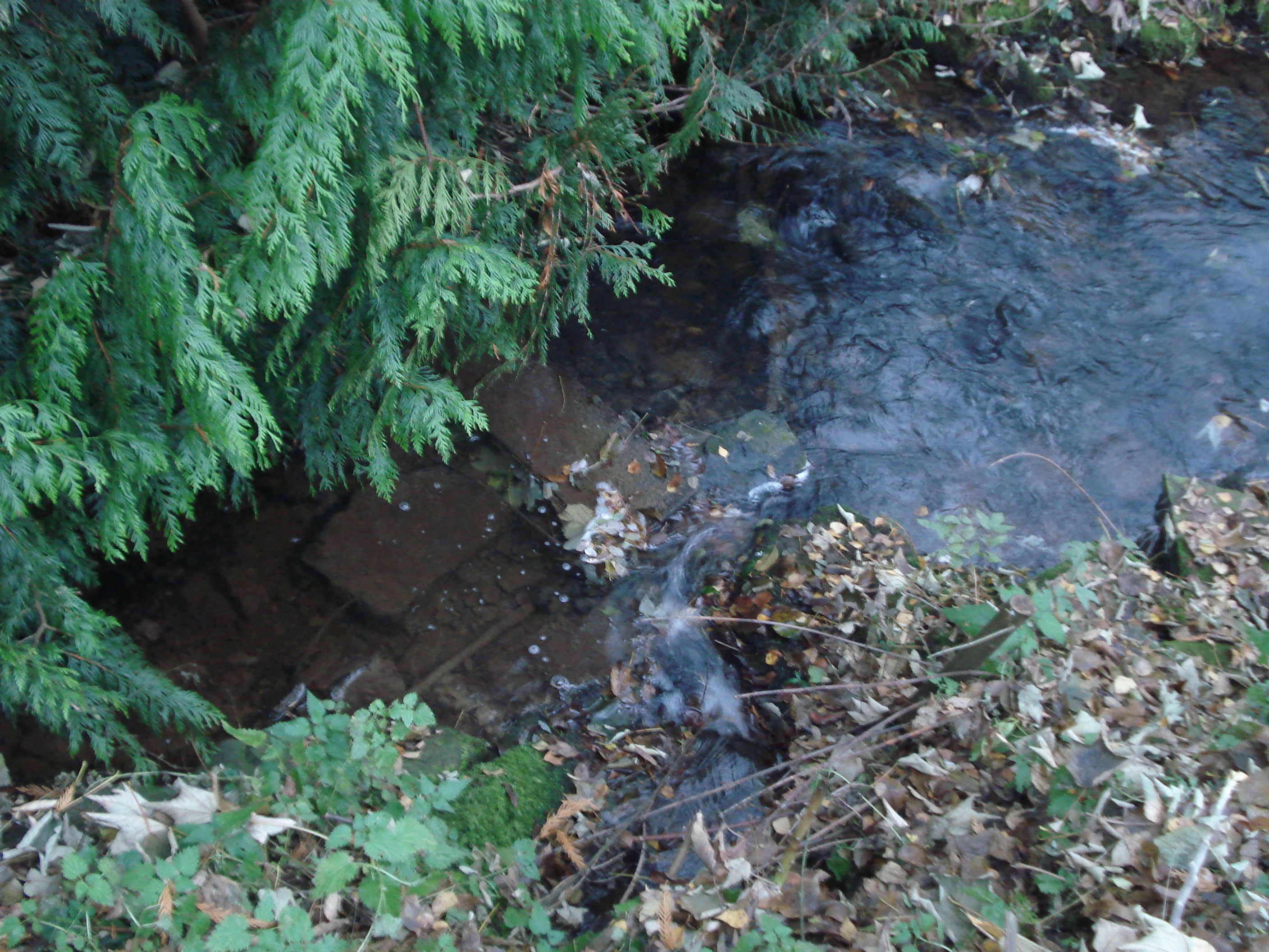 Der Elsabach (Rohr unten) mündet in die Bieber (von links nach rechts)